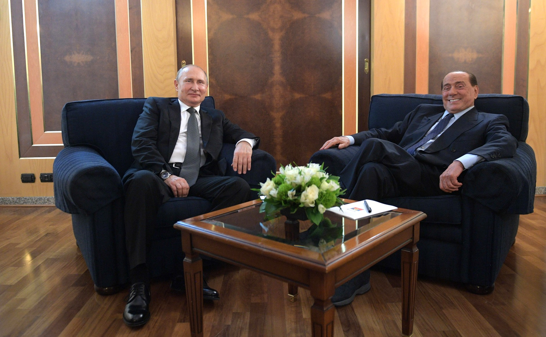 По окончании официальной программы визита в Италию Владимир Путин провёл в римском аэропорту Фьюмичино краткую частную встречу с экс-председателем Совета министров Итальянской Республики Сильвио Берлускони.